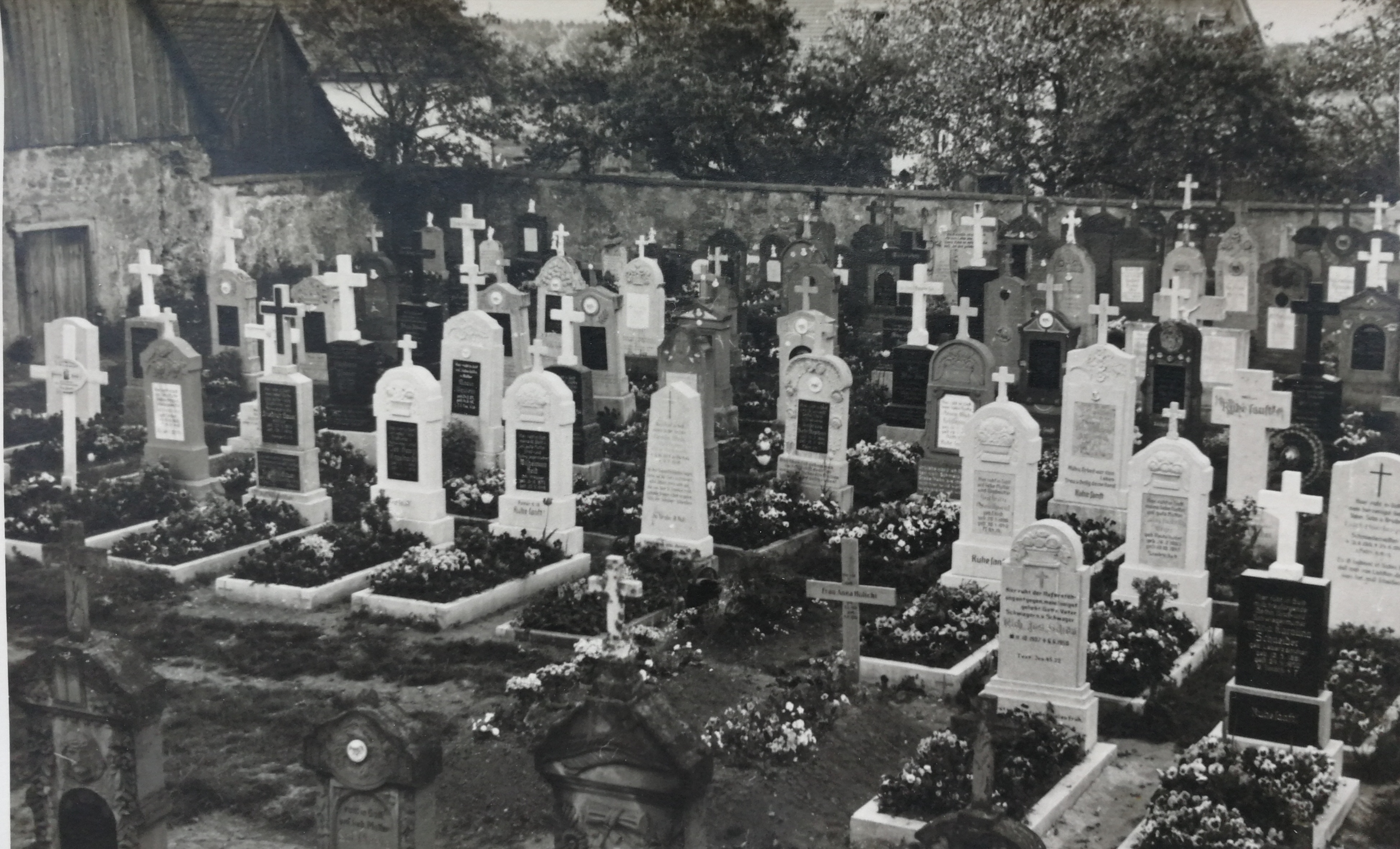 Friedhof Sammenheim im Mai 1951